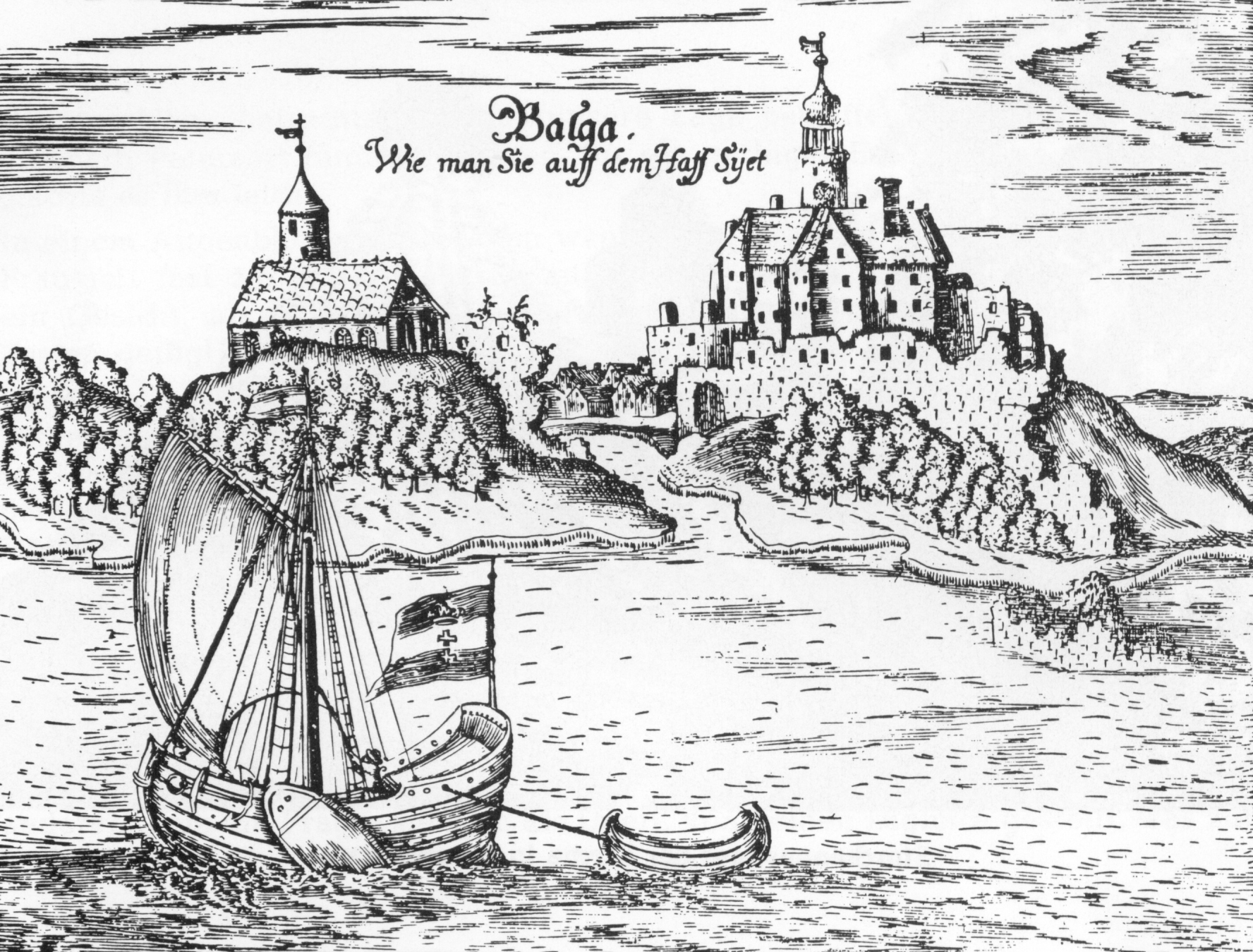 Historische Ansicht von Balga